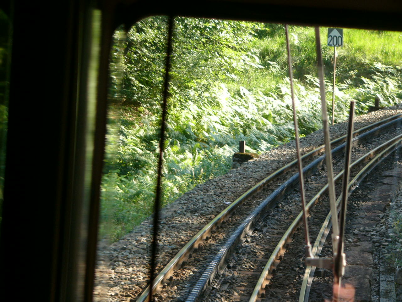 Voie du Chemin de fer suisse Martigny-Châtelard depuis la cabine de conduite d'une automotrice De gauche à droite : rail, crémaillère, rail, 3e rail (alimentation électrique)